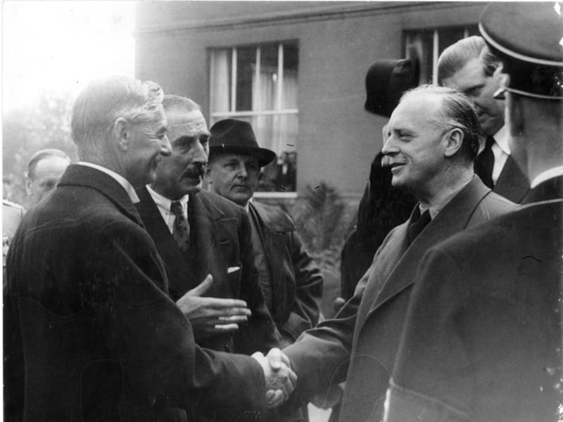 Scherl: Der zweite Besuch des britischen Ministerpräsidenten Chamberlain in Deutschland, Reichsaussenminister v. Ribbentrop, der Ministerpräsident Chamberlain nach dem Kurhotel Petersberg begleitet hat, verabschiedet sich vor dem Kurhotel von dem englischen Gast. Neben Chamberlain der britische Botschafter in Berlin Henderson und Staatssekretär Frhr. v. Weizsäcker. Fot.: 22.9.1938, 12571-38